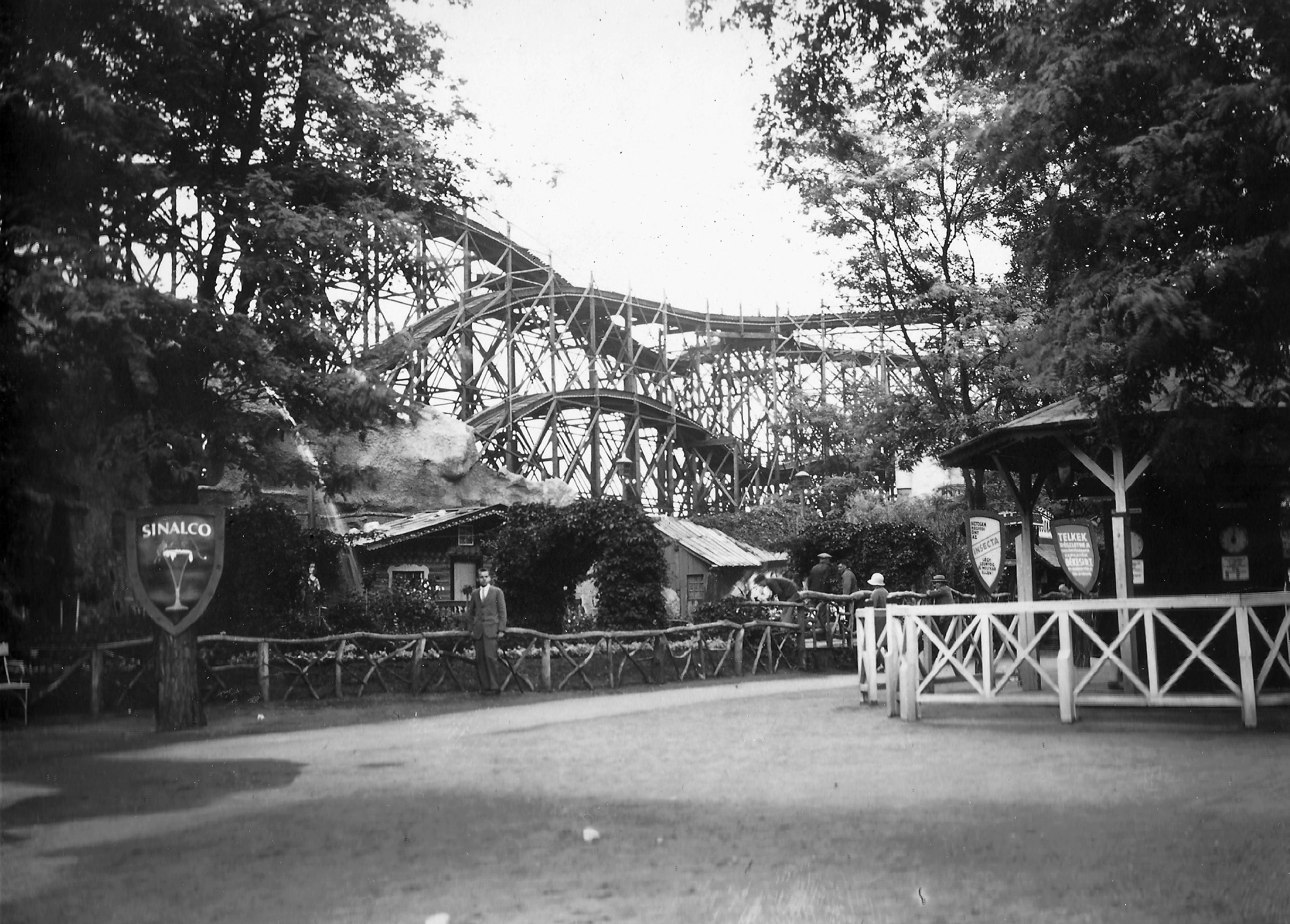 hullámvasút. Location: Hungary, Budapest XIV. Tags: amusement park, ad, Budapest Title: hullámvasút.